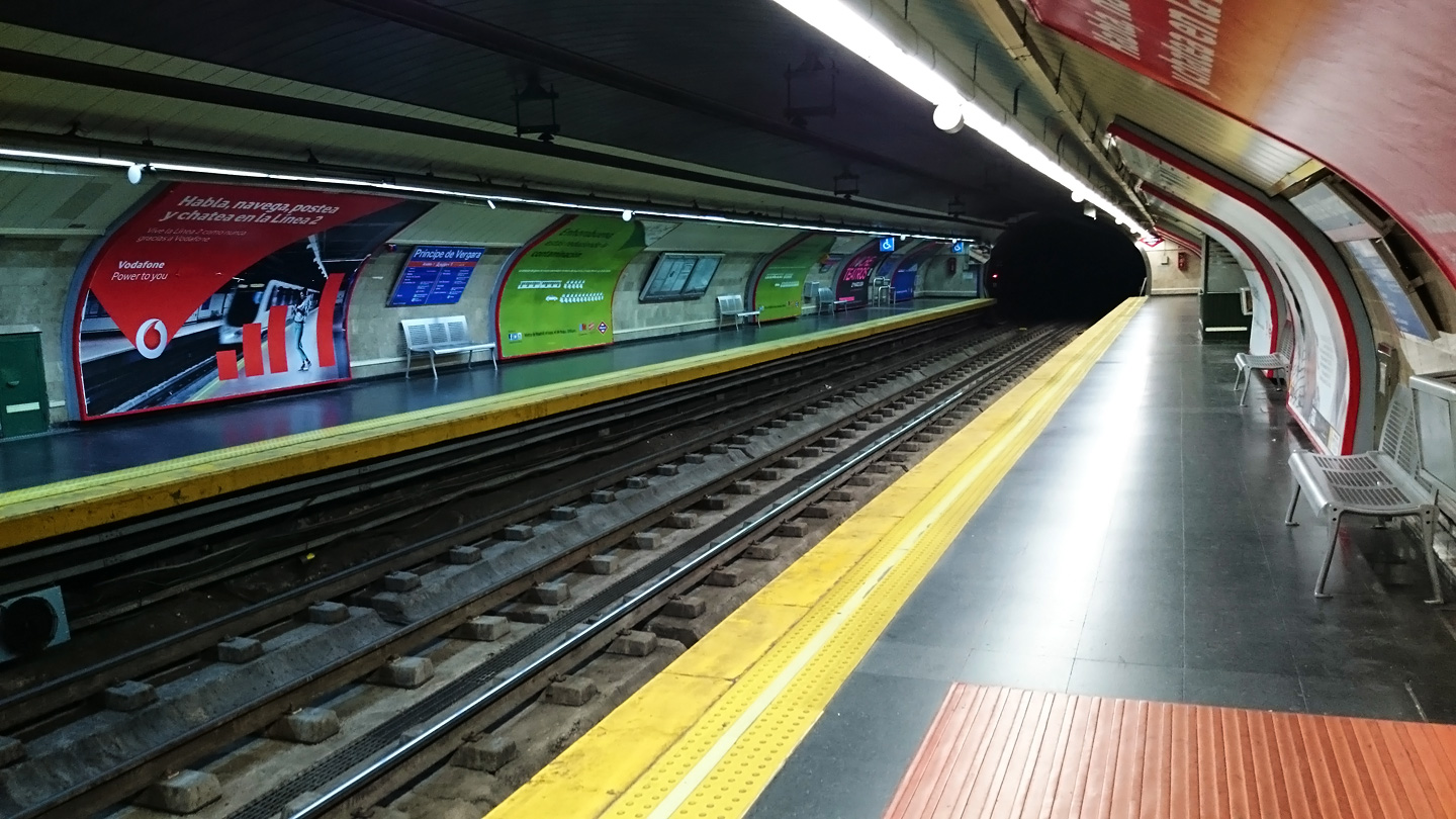 Тип старых станций метро в центре